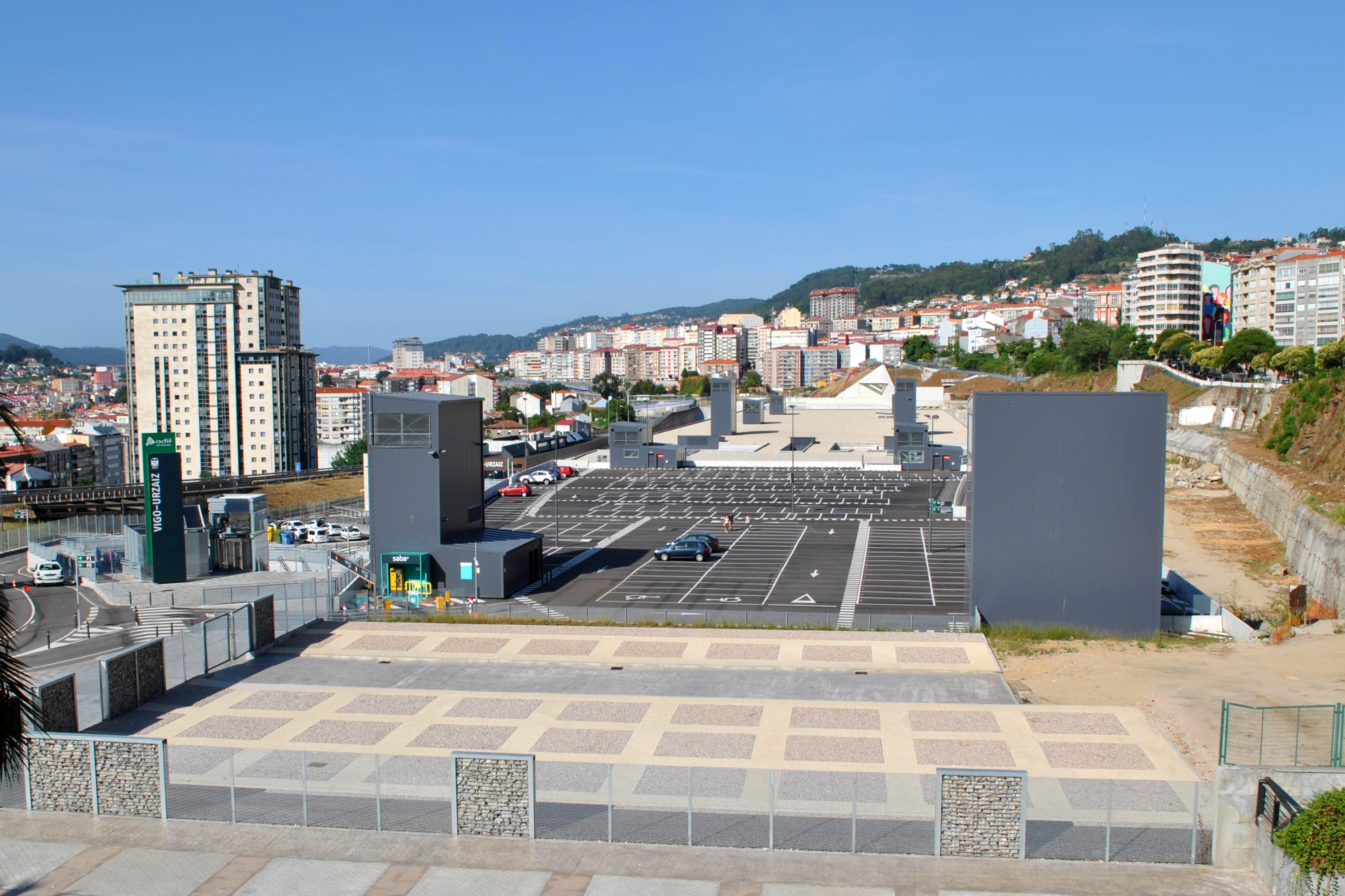 Véxase o título e as categorías.